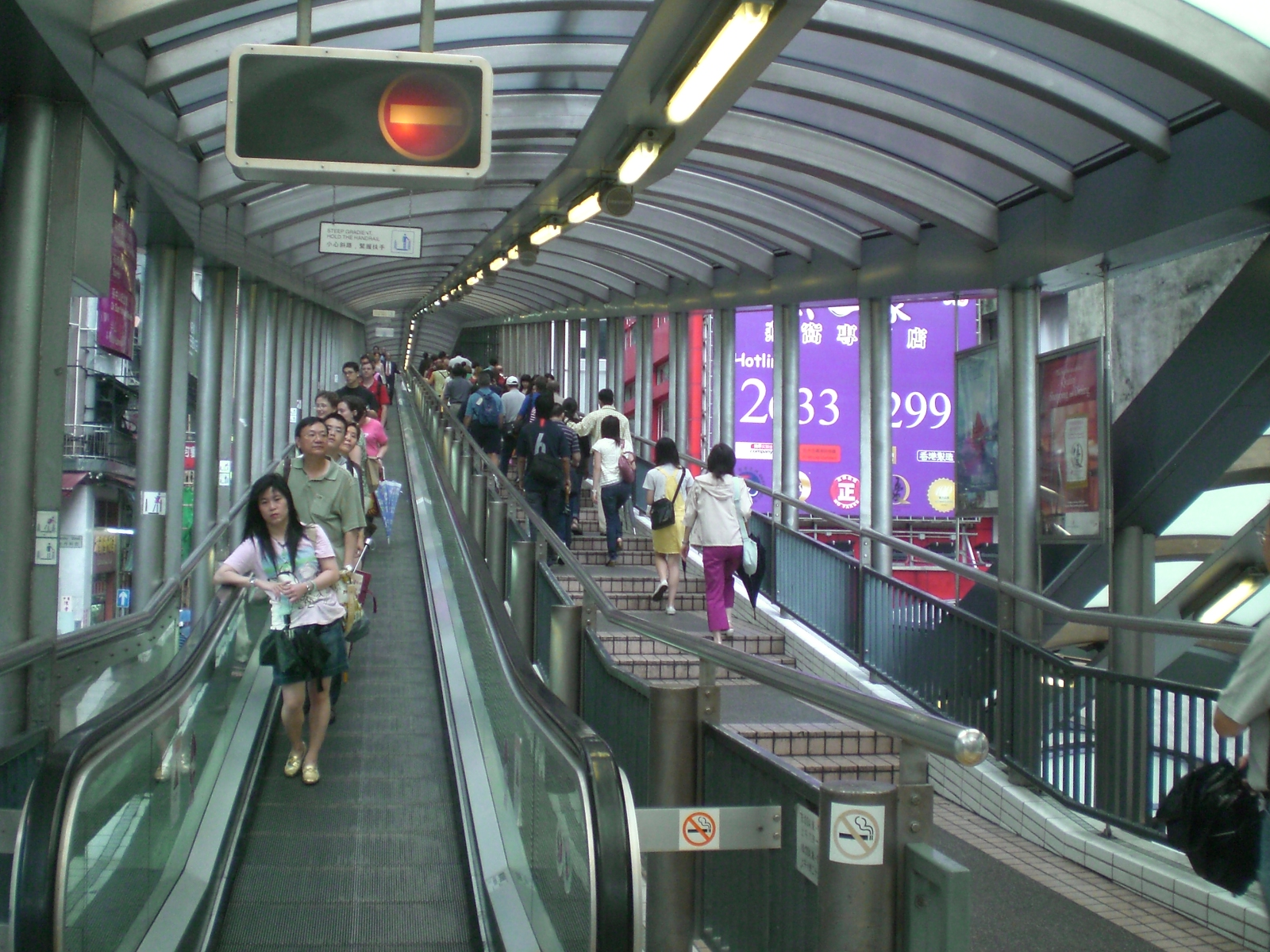 中文（香港）: 香港zh:中環閣麟街中環至半山自動扶梯系統